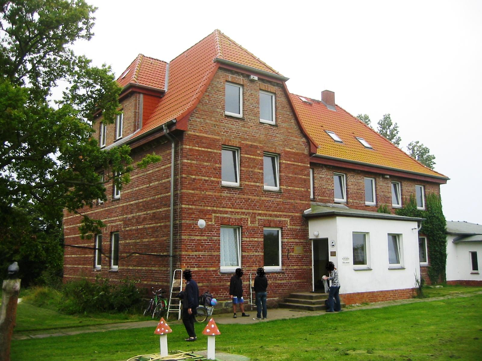 Hauptgebäude mit Vogelschutzstation der Greifswalder Oie